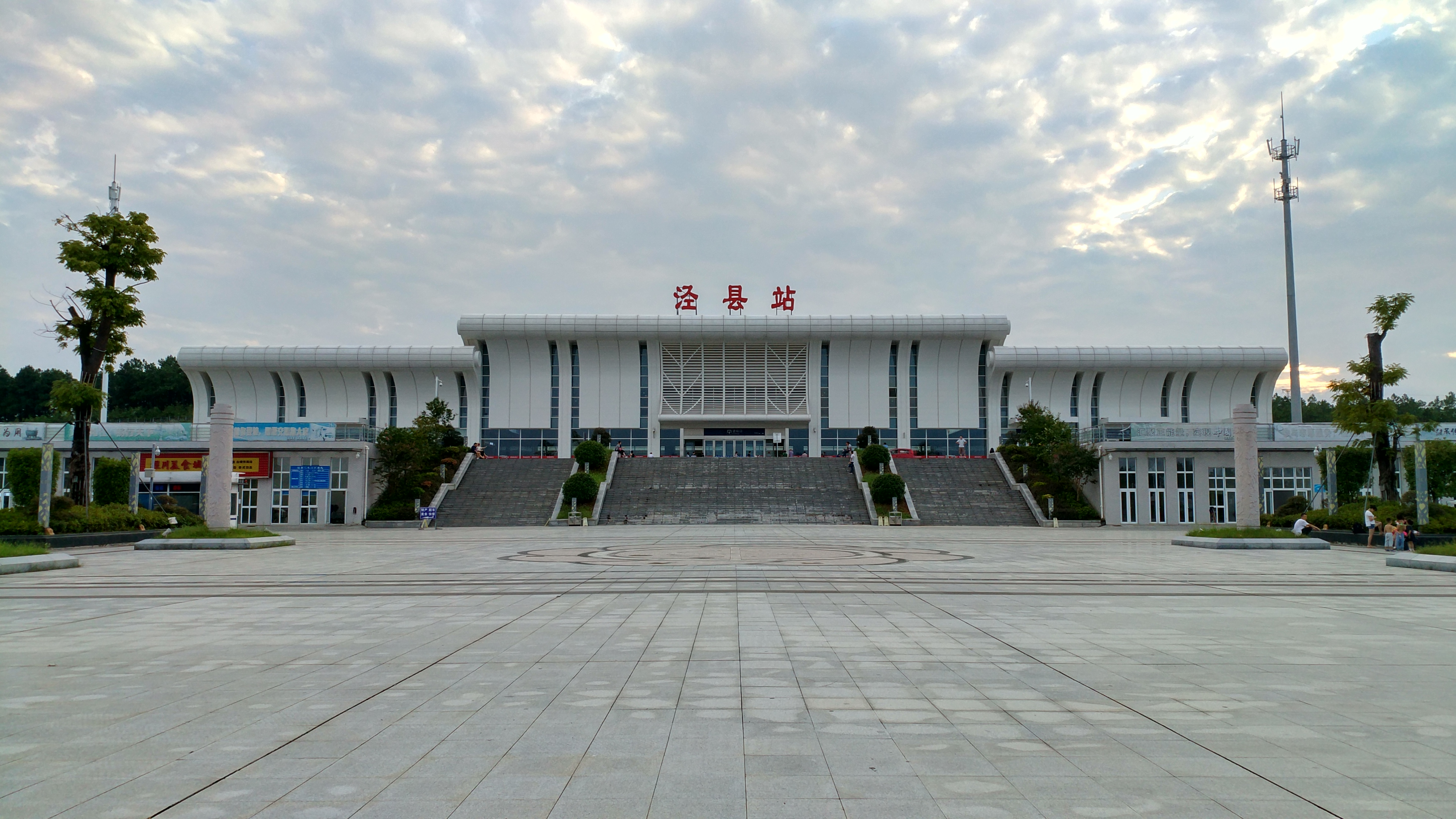 泾县站